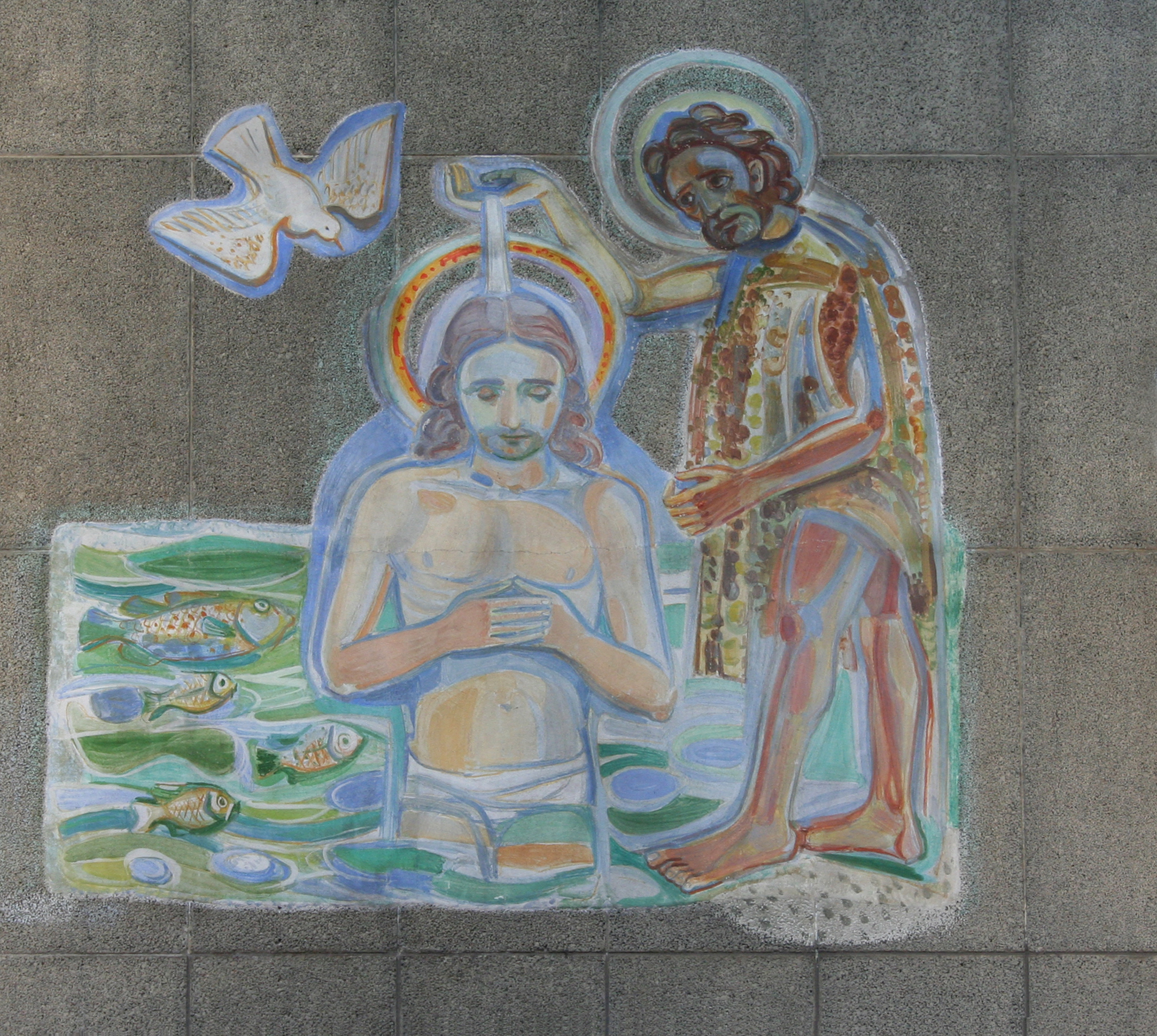 Römisch-katholische Pfarrkirche St. Karl Luzern, Taufe Christi von Hans Stocker